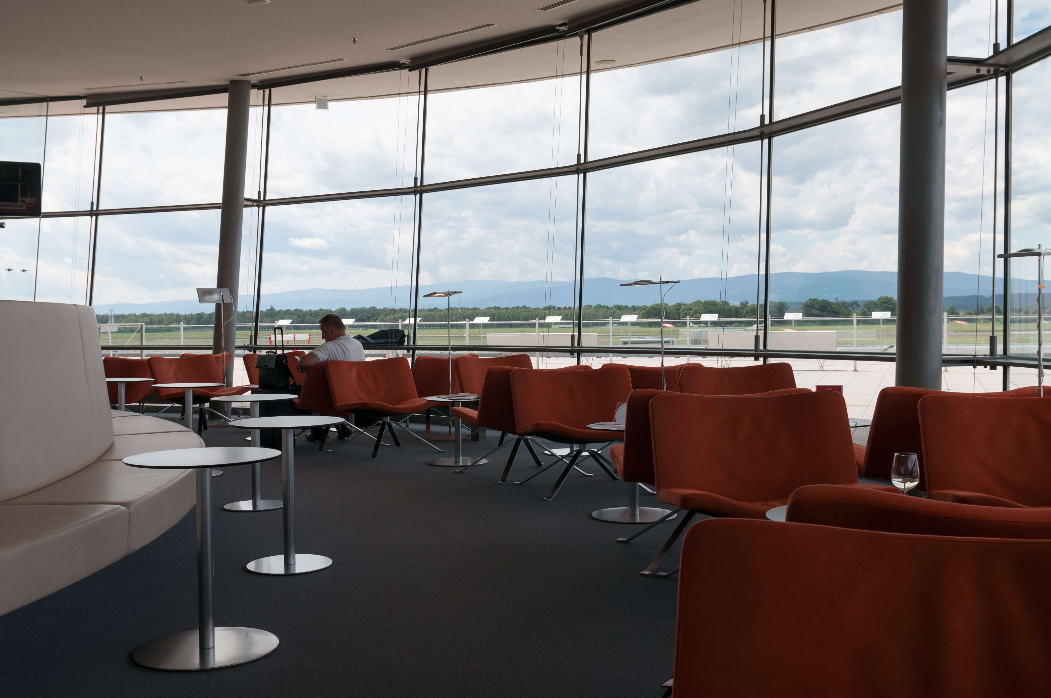 Lounge im Flughafen Graz